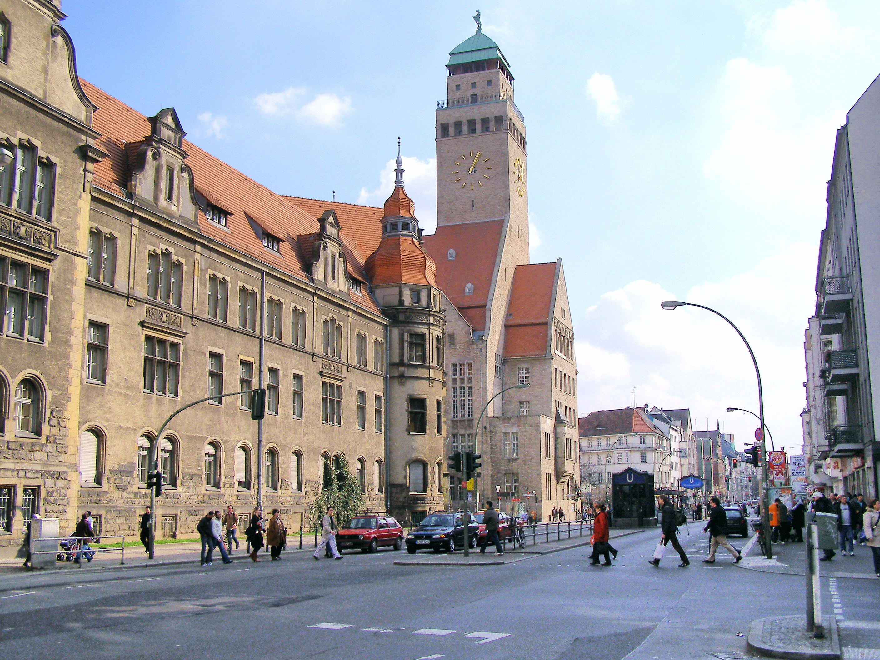 U-Bahn Haltestelle Rathaus Neukölln (Berlin) (mit Rathaus links) underground station Rathaus Neukölln (Berlin) (the city hall on the left) stanice metra Rathaus Neukölln (Berlín) (radnice vlevo)